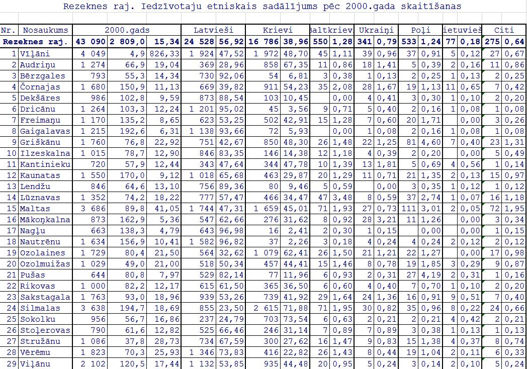 результаты переписи населения Латвии ни 01.04.2000